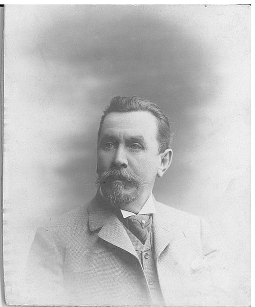 Константин Капитонович Ушков (1850—1918) — предприниматель и меценат